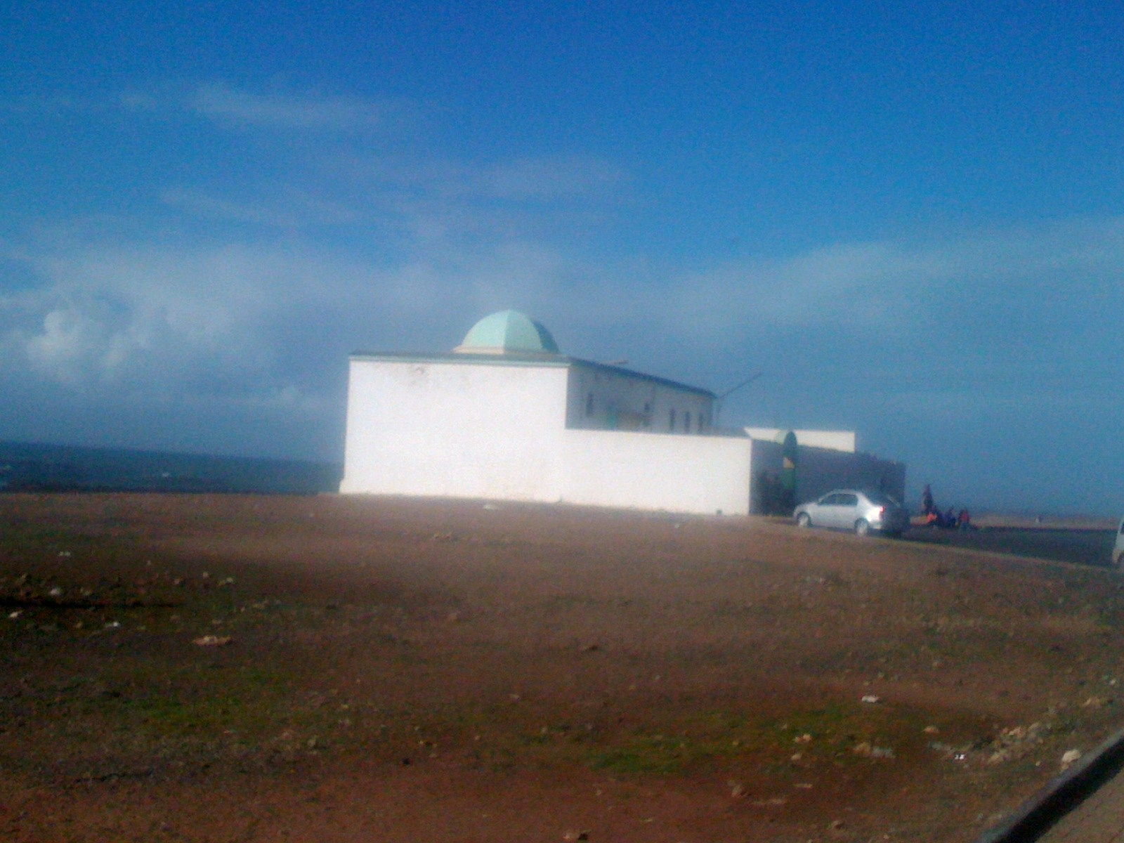 Marabout de Sidi Moussa Doukkali à Salé